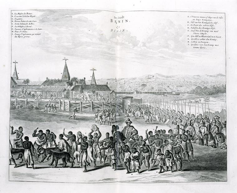 "De Stadt Benin"